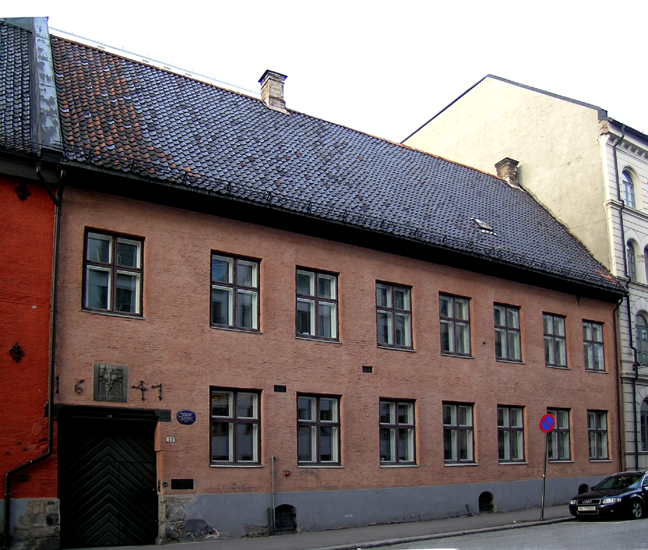 Magistratsgården, Dronningens gate 11, Oslo. Built 1647.